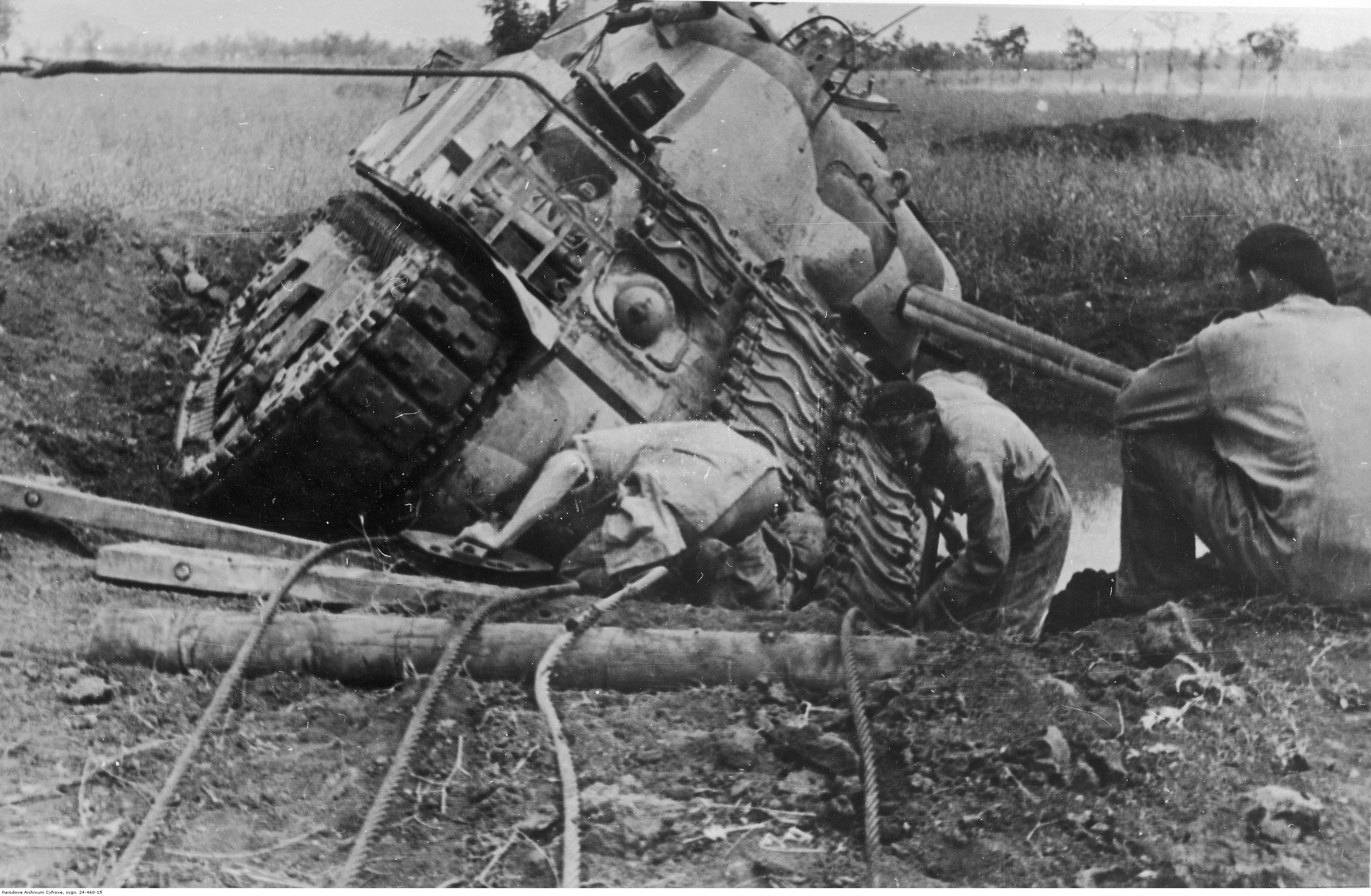 Pole bitwy o Piedimonte. Wyciąganie z leja po bombie czołgu M4 Sherman z 6 Pułku Pancernego "Dzieci Lwowskich". Archiwum Fotograficzne Tadeusza Szumańskiego. Sygnatura: 24-460-15